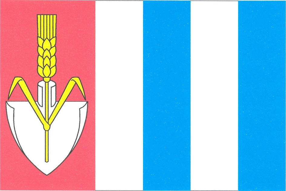 Vlajka obce Blažim